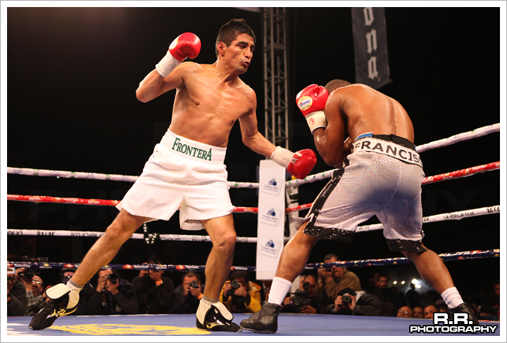 Evento Box, Erik Terrible Morales vs Francisco Lorenzo. Sabado, 18 de Diciembre del 2010 en el Estadio Caliente en Tijuana, Mexico. Boxing event, Erik Terrible Morales vs Francisco Lorenzo. Saturday, December 18th of 2010 at Caliente Stadium, in Tijuana, Mexico.